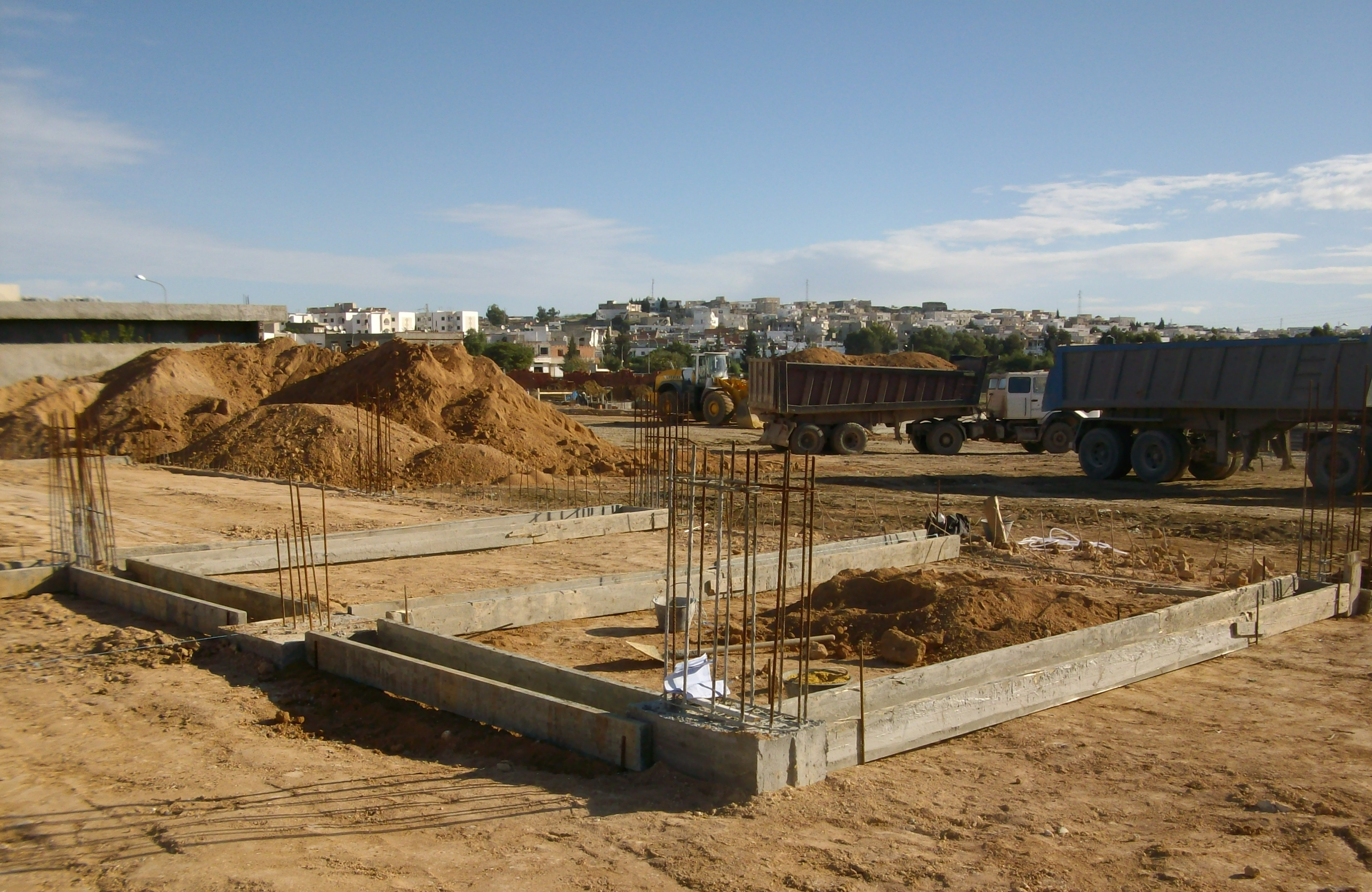 Coffrage des longrines